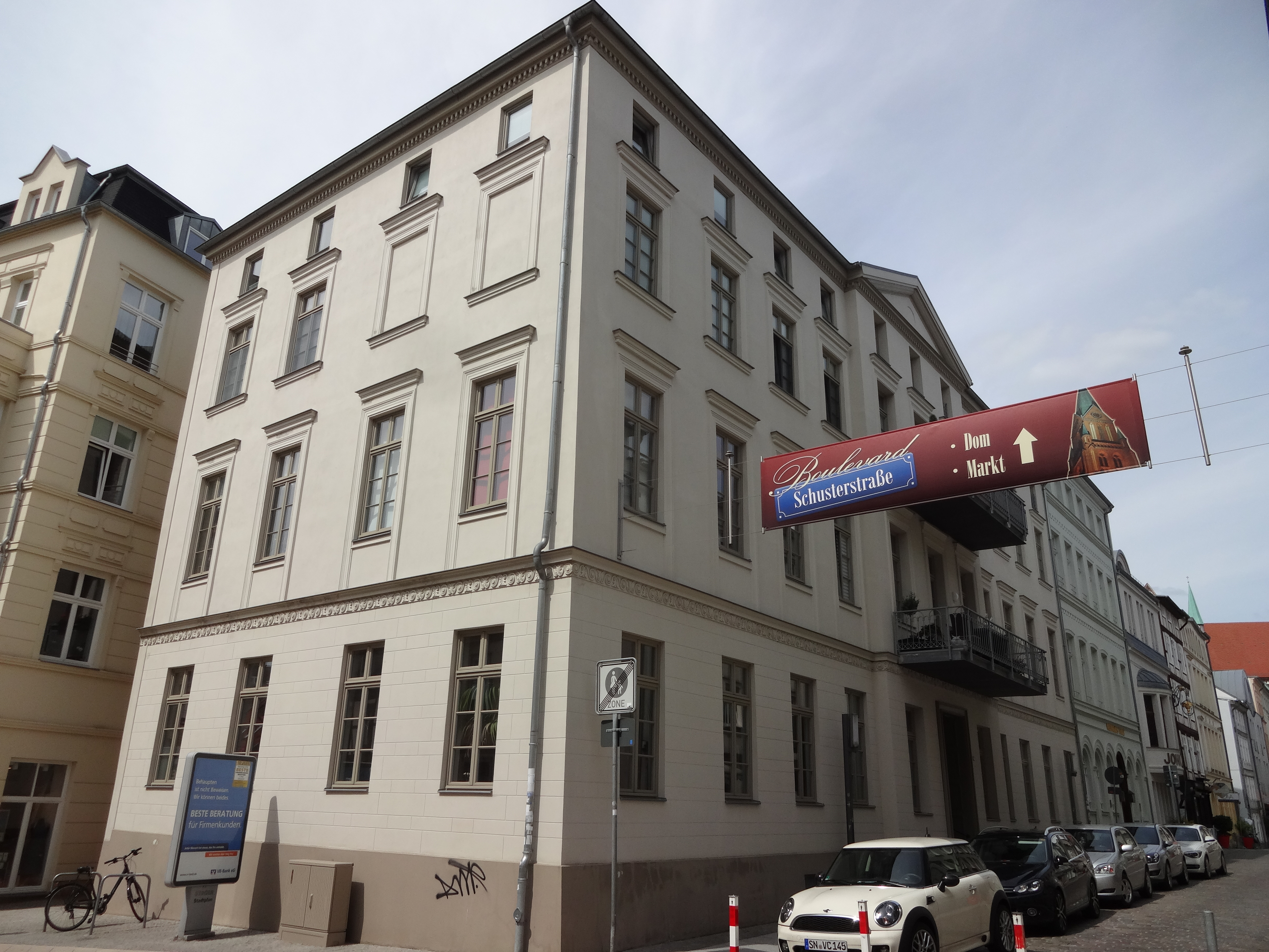 Denkmalgeschütztes Wohnhaus in der Schusterstraße 17 in Schwerin